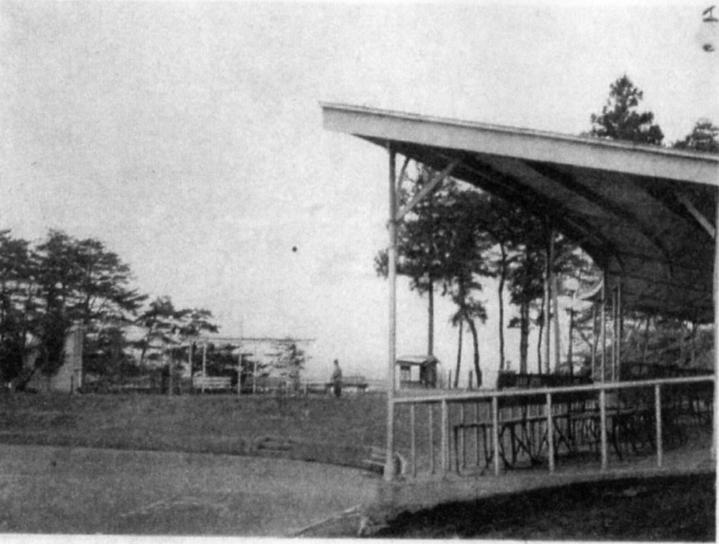 説明文に「婦負郡長岡 自然美と人口美の調和よき遊園地なり、風光及展望は頗るよし。毎年八月八日の藩祖祭は富山市の年中行事にして参拝者雑踏を極む附近なる新墓地は日々墓参者は絶えぬ。 越中鉄道、聯隊橋より十分間」とあり